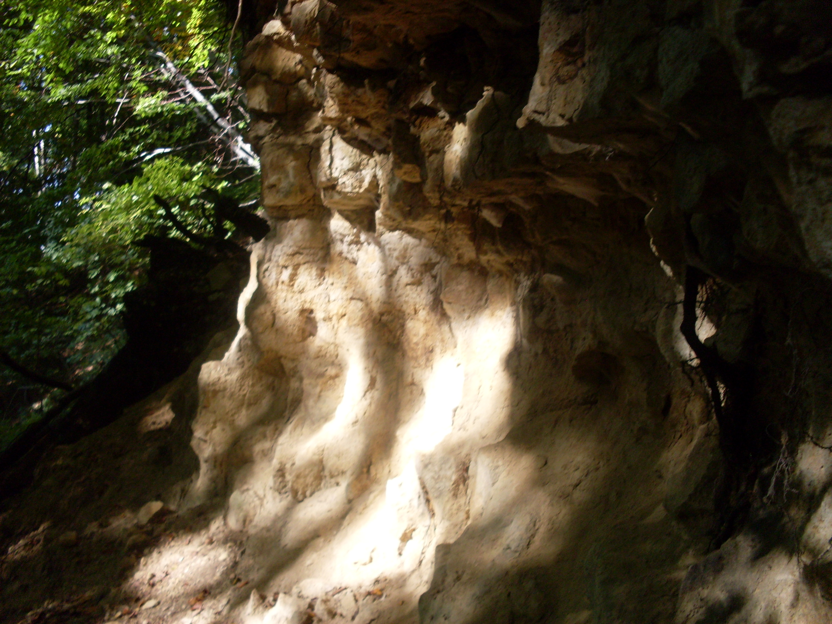 Góra Czerwieniec.Tenczynek.Była kop. piaskowca